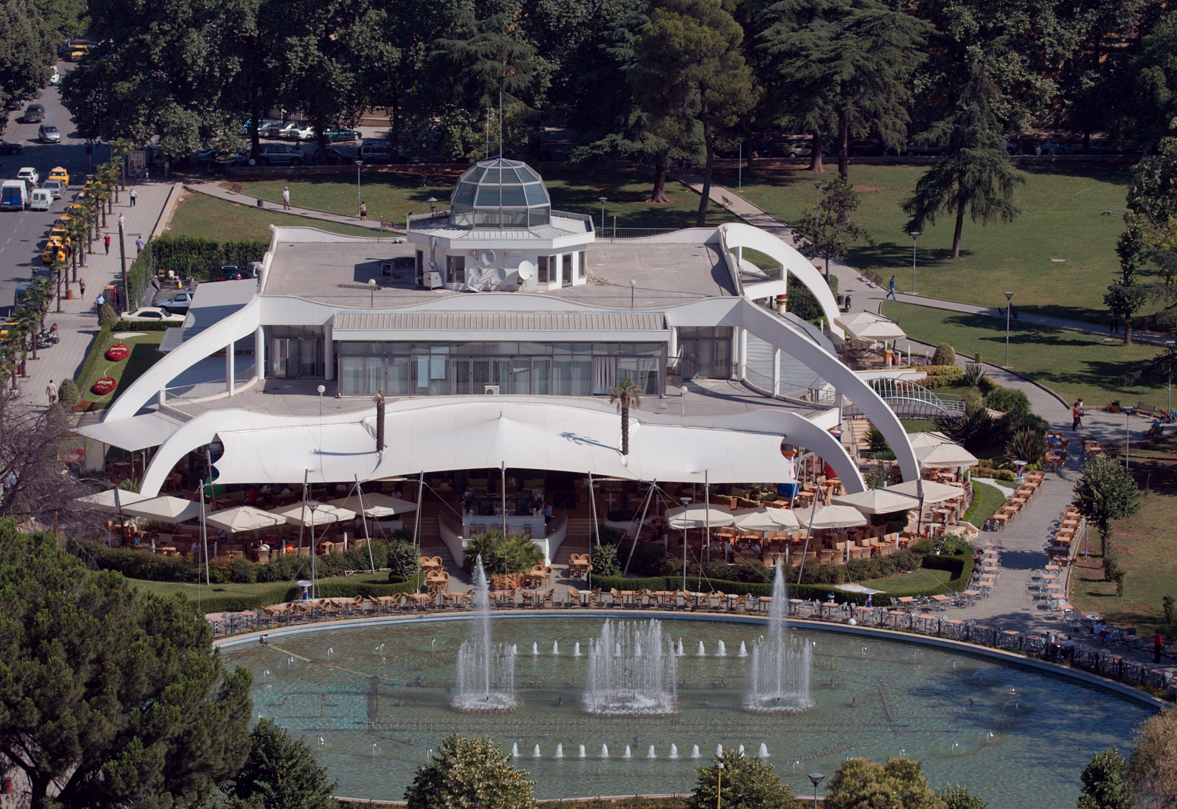 Taiwan Center in Parku Rinia, Tirana, Albania